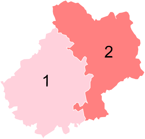 Résultats des élections législatives du Lot en 2012